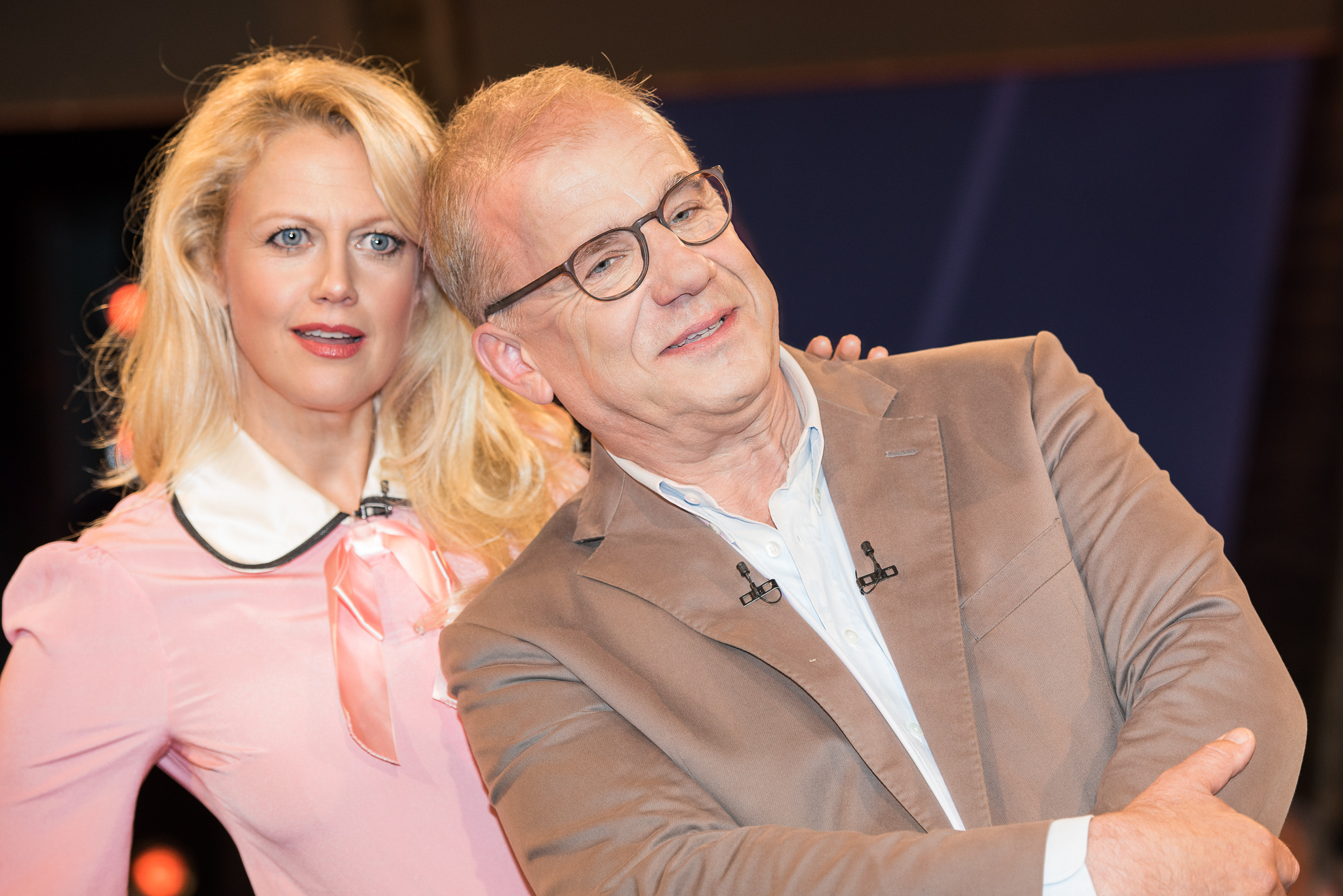 Barbara Schöneberger,Hubertus Meyer-Burckhardt,Live on tape,NDR Talk Show